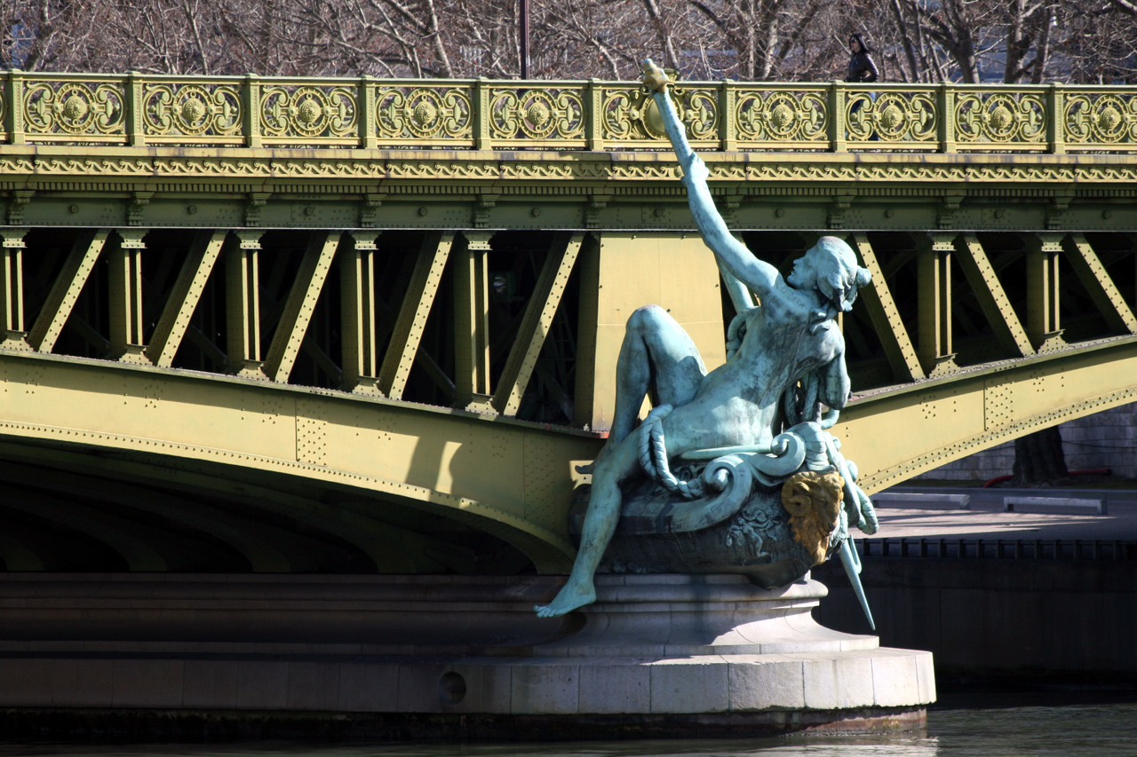 Jean-Antoine Injalbert (français, 1845-1933): Le Commerce, 1897, figure monumentale en bronze, Paris, Pont Mirabeau.